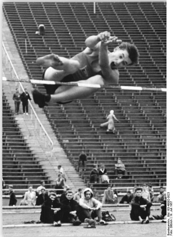 Leipzig, Turn- und Sporttreffen, Hochsprung Zentralbild Leipzig Son-Qu 19.7.1957 Dittrich Turn- und Sporttreffen der Jugend in Leipzig. Anlässlich des Turn- und Sporttreffens der Jugend in Leipzig wurden am 19.7.1957 die Meisterschaften der Jugend in der Leichtathletik weitergeführt. In verschiedenen Disziplinen wurden bereits die Jugendmeister ermittelt. UBz: Dietmar Schröder von Lokomotive Pirna wurde mit 1,84 m deutscher Meister im Hochsprung. Diese Höhe bedeutet zugleich einen neuen DDR-Rekord.